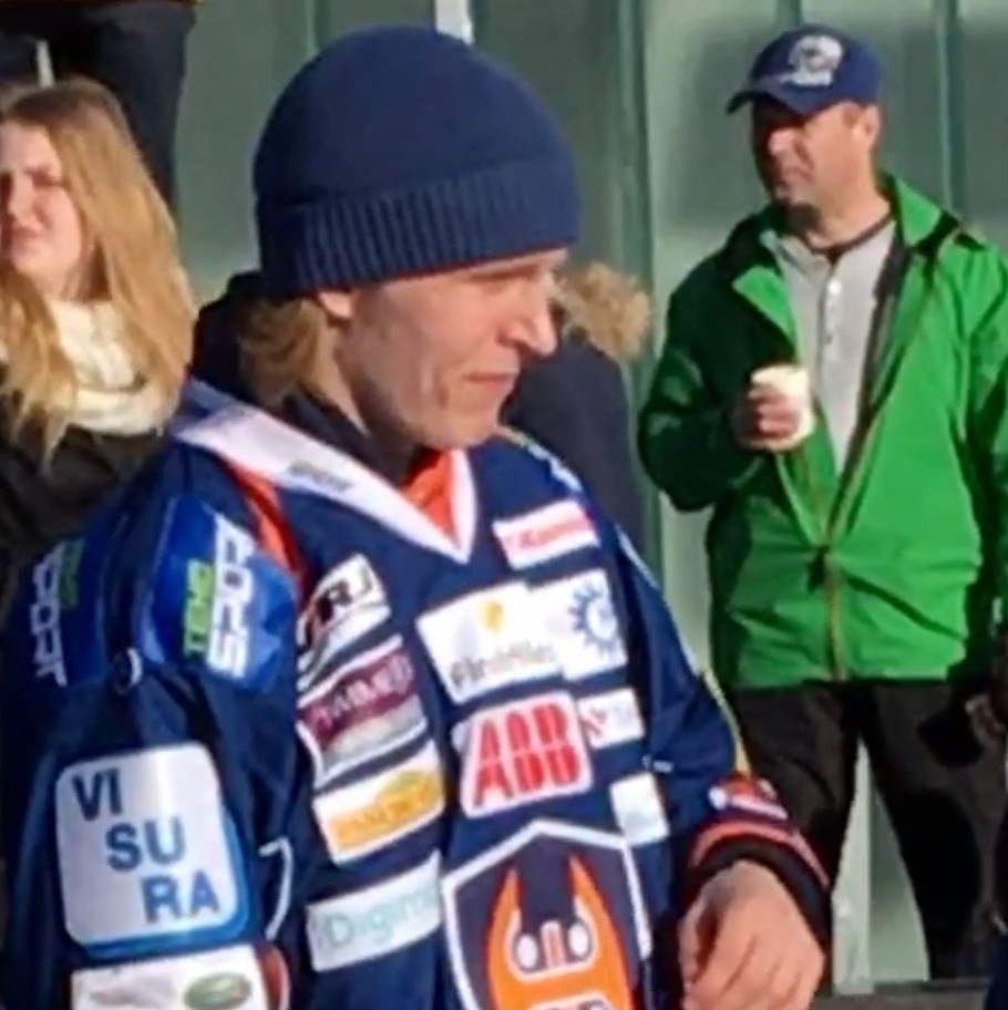 Jääkiekkoilija Patrik Laine Helsingin Rautatientorilla maaliskuussa 2016.